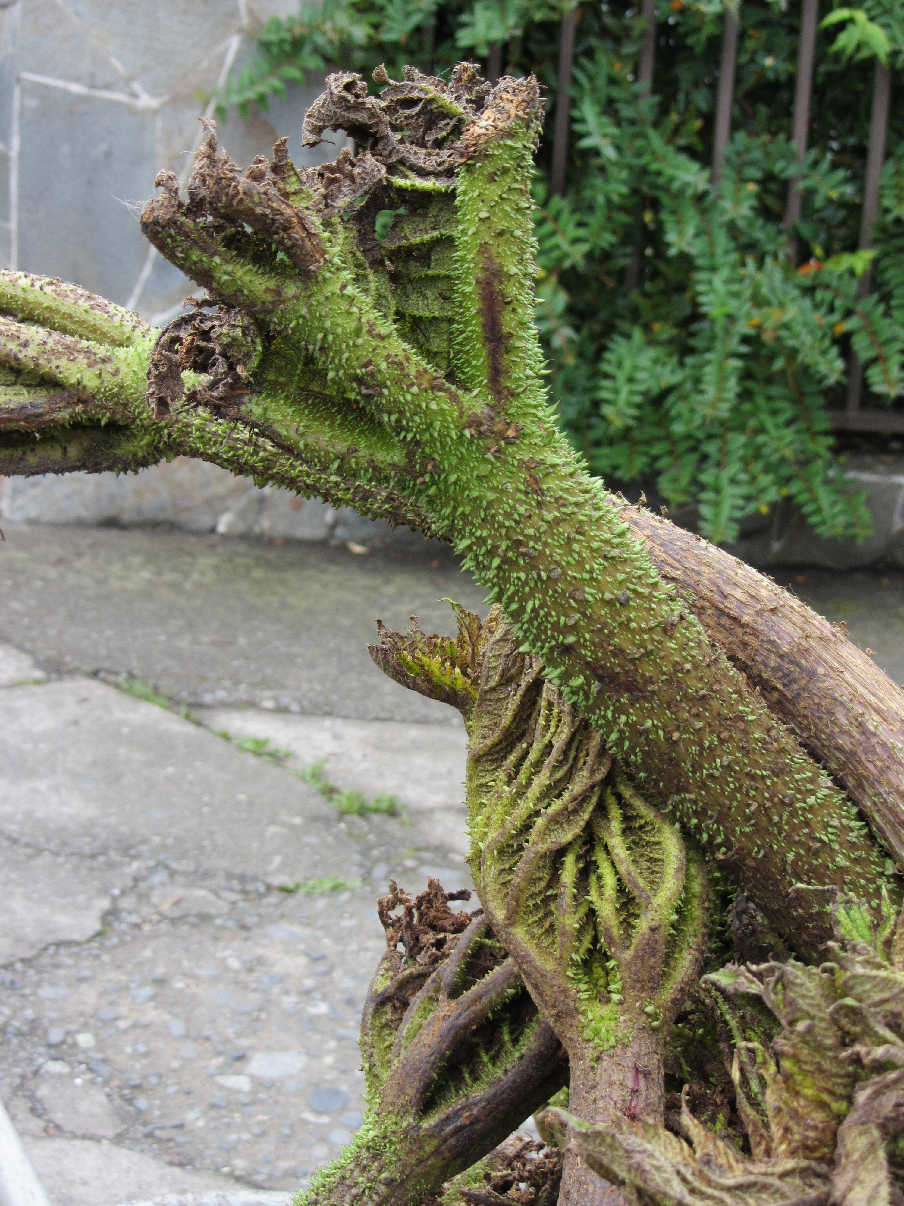 Nalcas a la venta en una calle de Puerto Varas, Chile